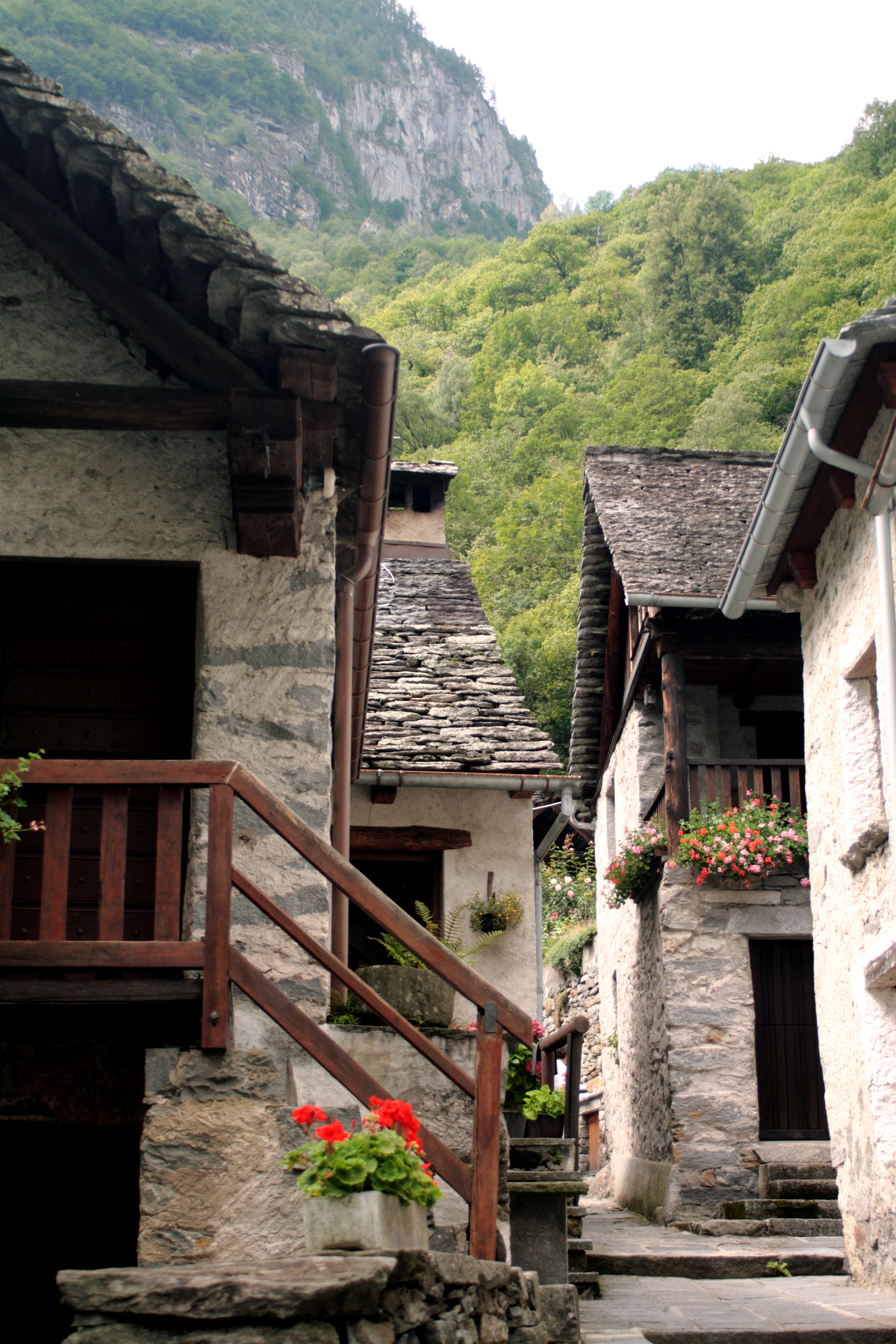 Foroglio, Ticino